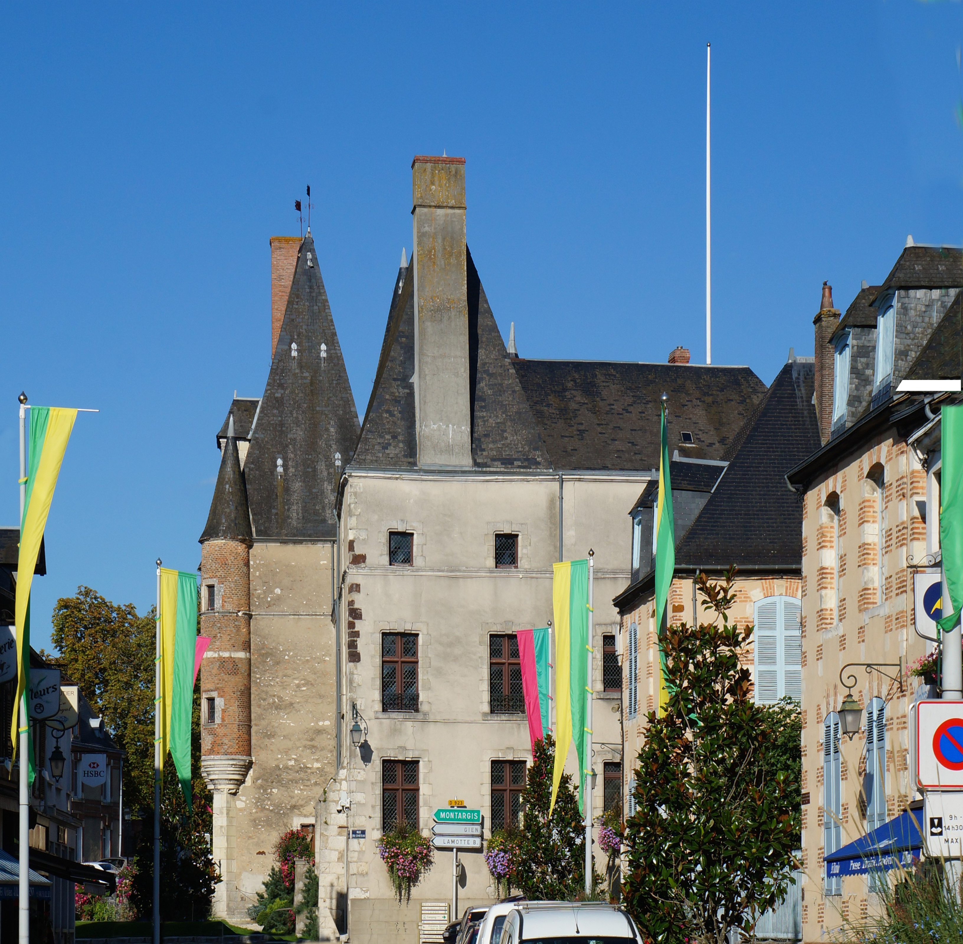 Château des Stuarts Aubigny-sur-Nère| Cher (département), France .